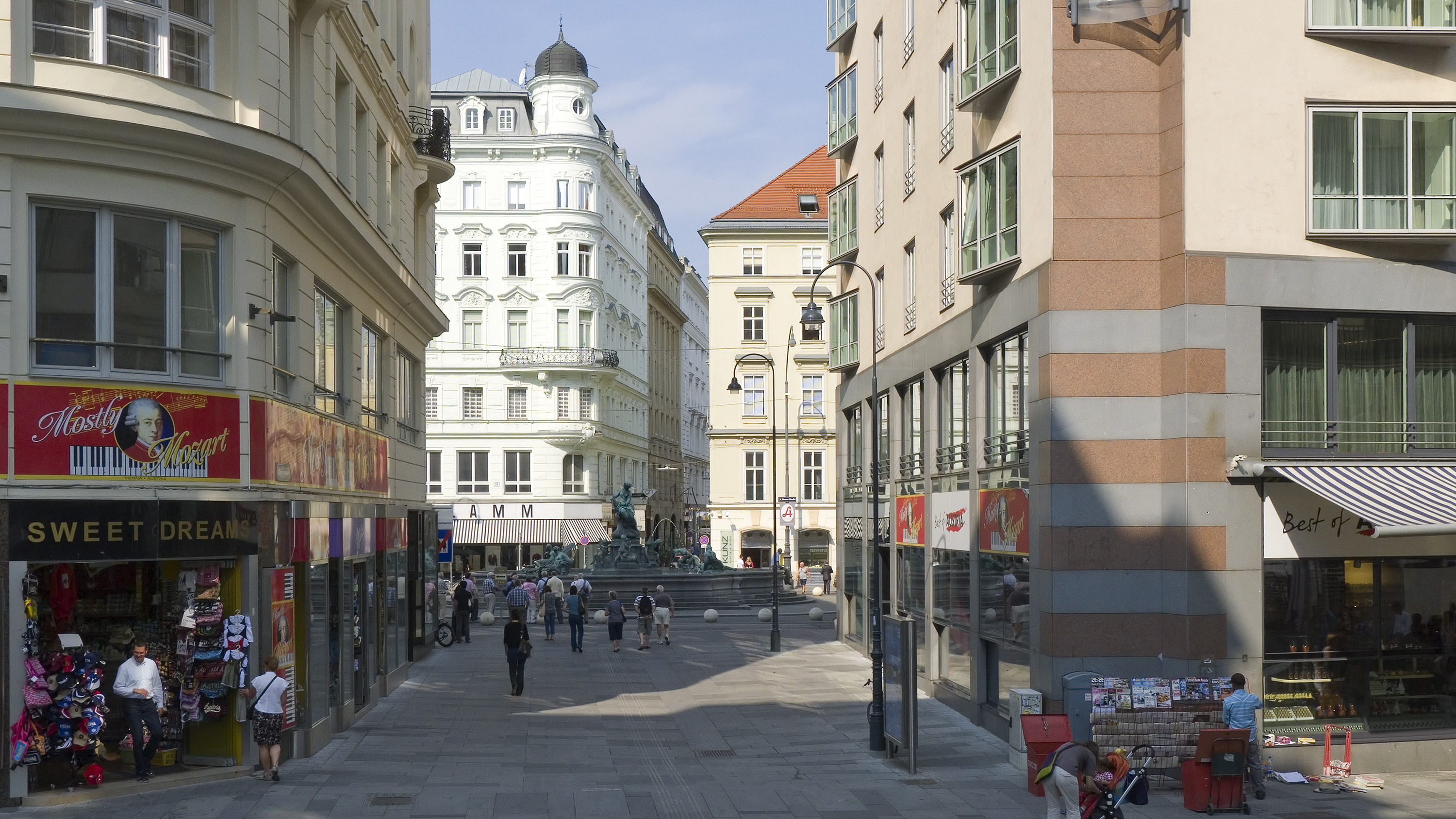 Donnergasse in Wien 1 bei der Kärntner Straße Richtung Westen